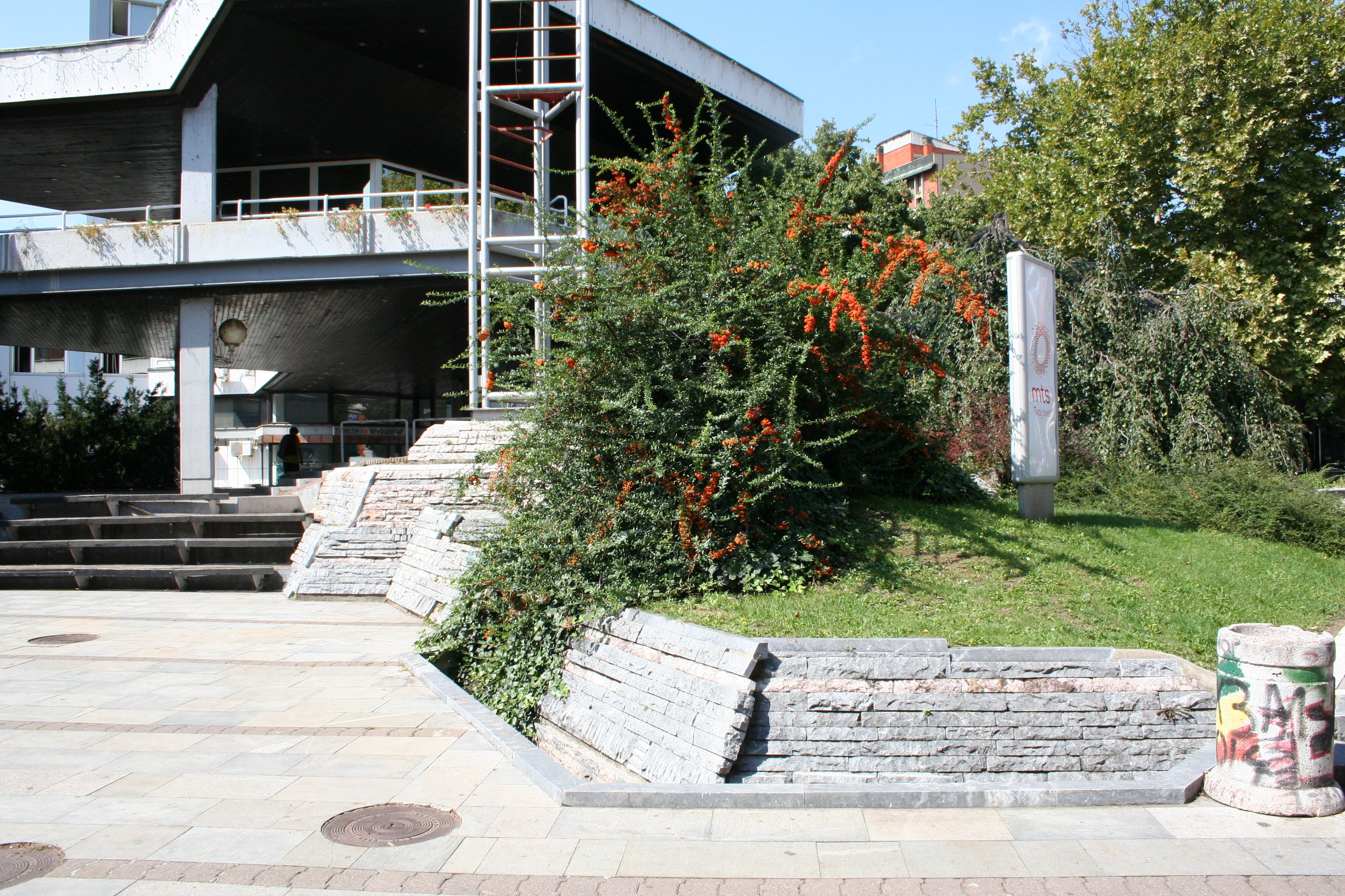 Ulice Valjeva